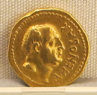 Ancient Roman coins in the Palazzo Massimo alle Terme